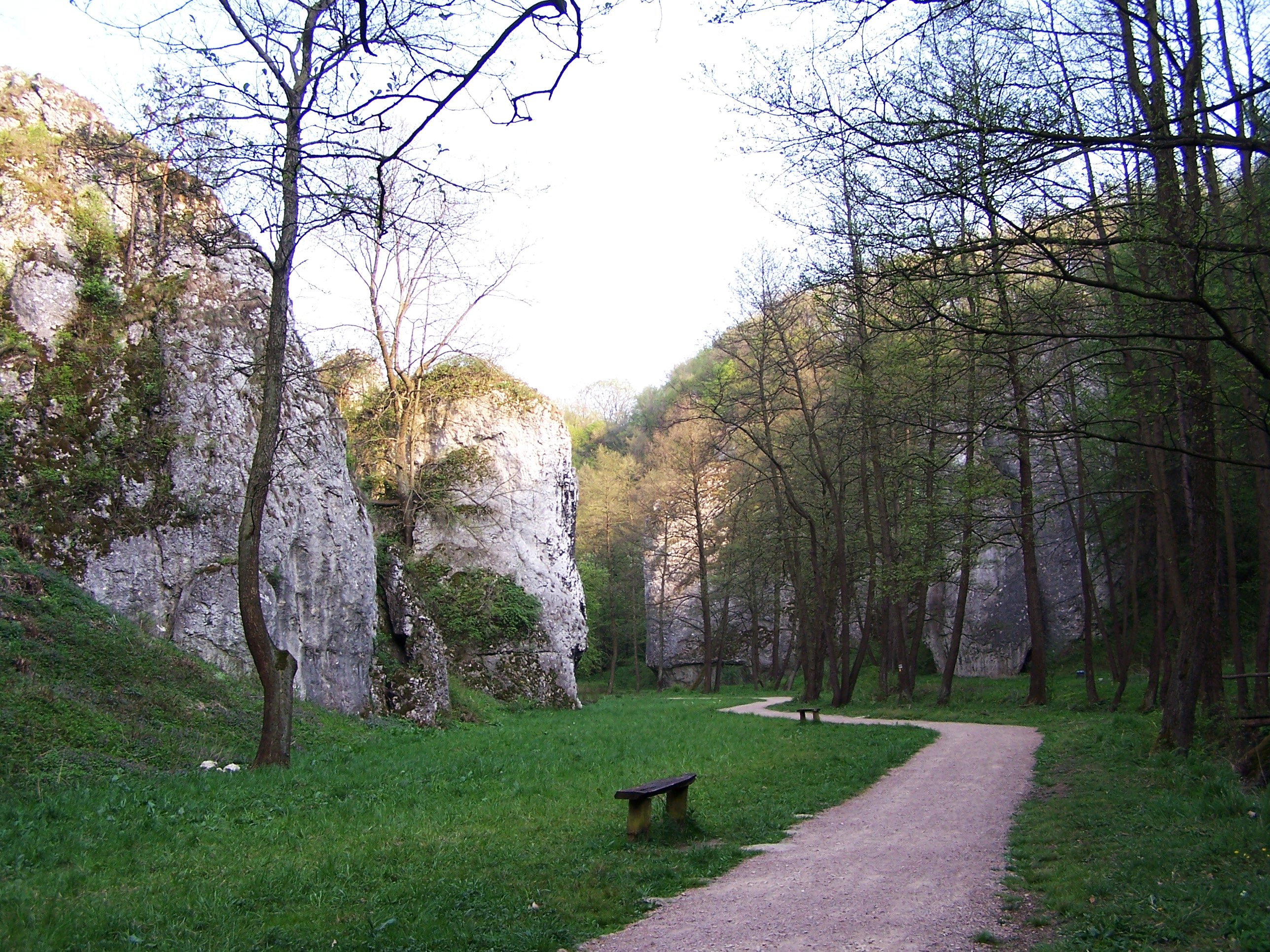 Dolina Mnikowska (Wyżyna Krakowsko-Częstochowska)